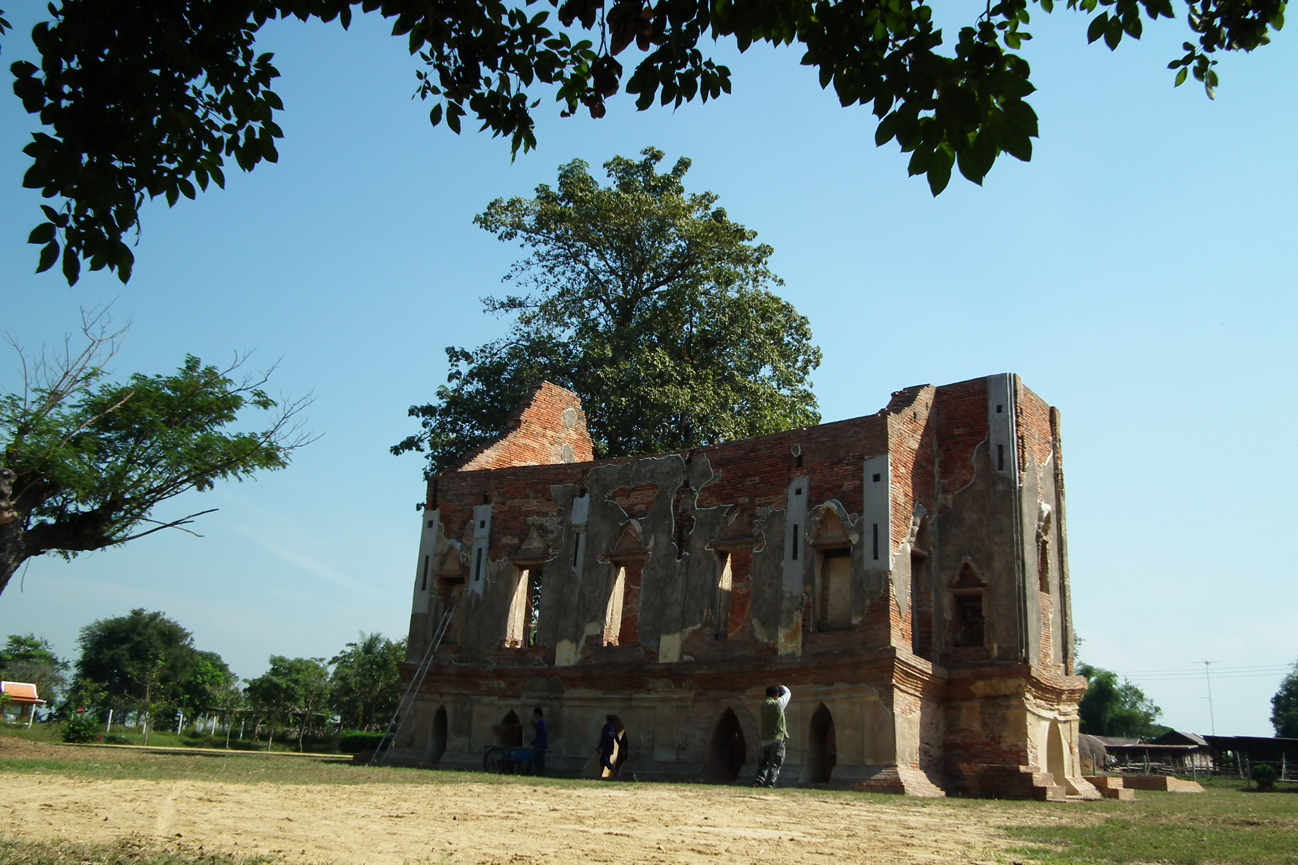 พระตำหนักคำหยาด(พระที่นั่งคำหยาด)